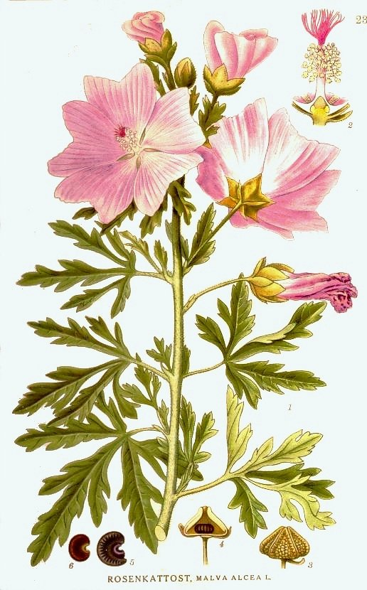 Original Description Rosenkattost, Malva alcea L.